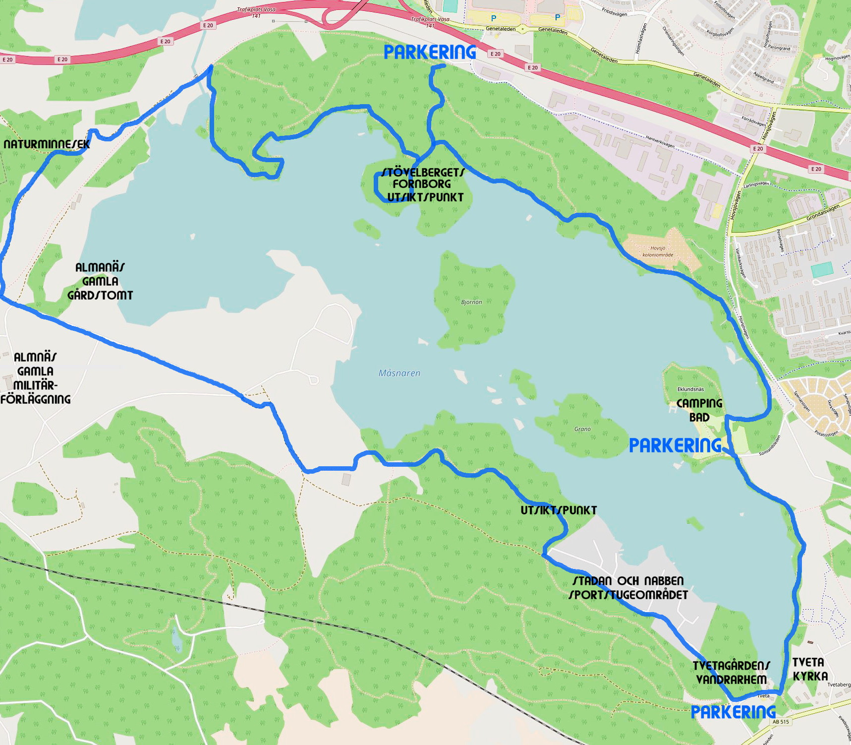 Måsnarenleden, bakgrundskarta från Open Street Map